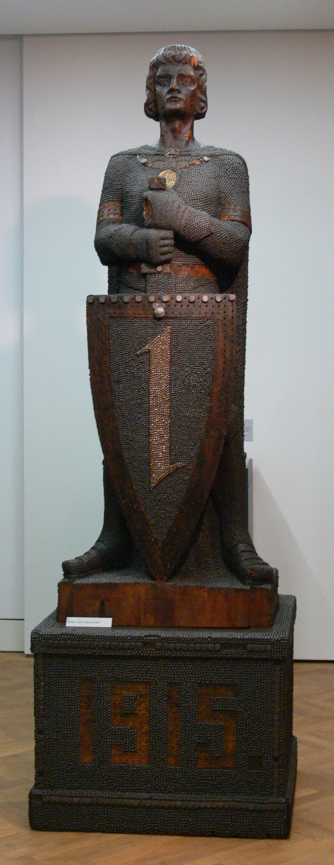 Nagelfigur „Roland“ mit Mannheimer Stadtwappen, 1915 Collection: Reiss-Engelhorn-Museen, Mannheim